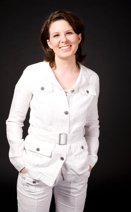 Mag.art. Beate Schreiter-Radel. Österreichische Malerin und Glaskünsterin.